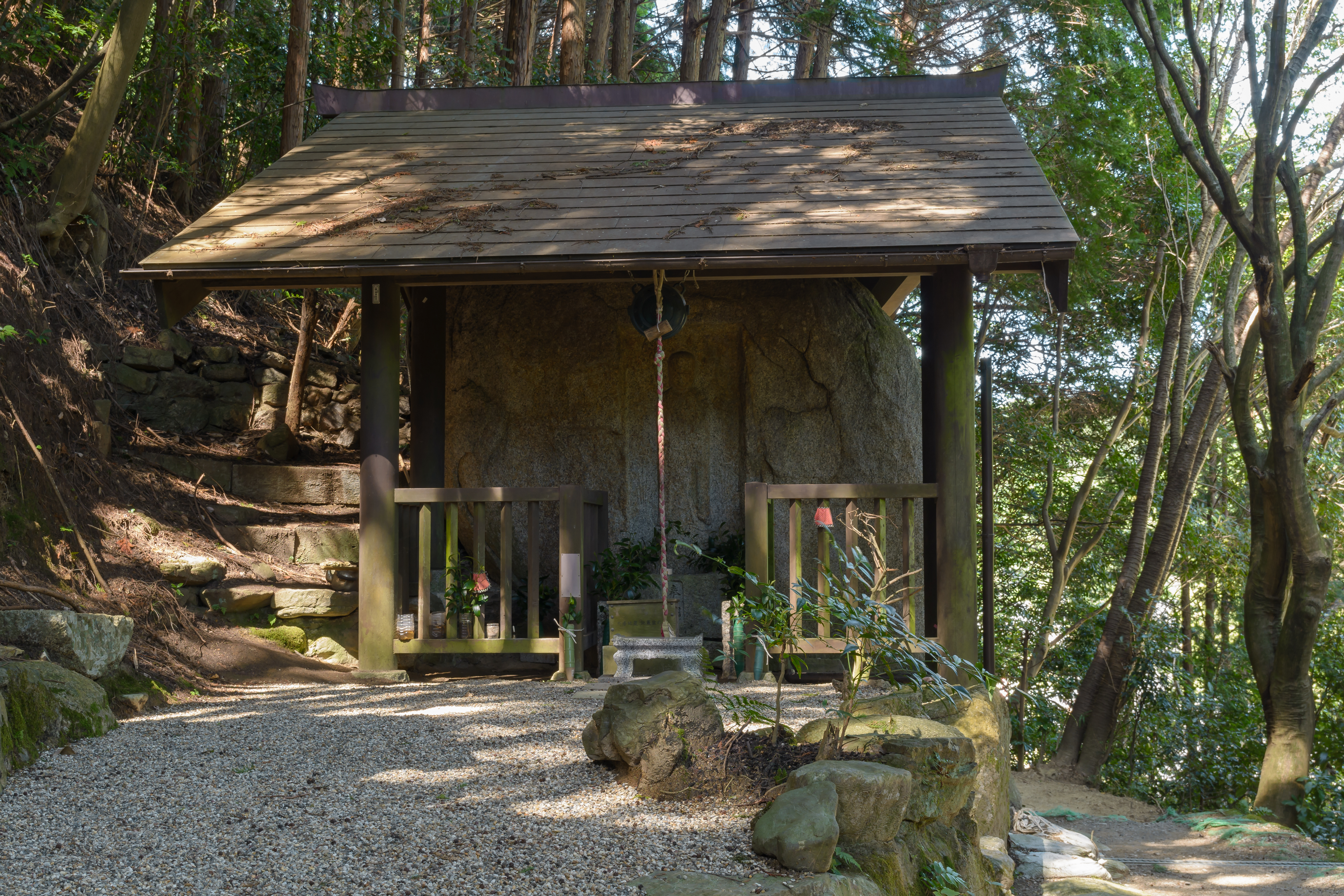 疱瘡地蔵（奈良市柳生町）、右下部に徳政碑文が刻まれている。